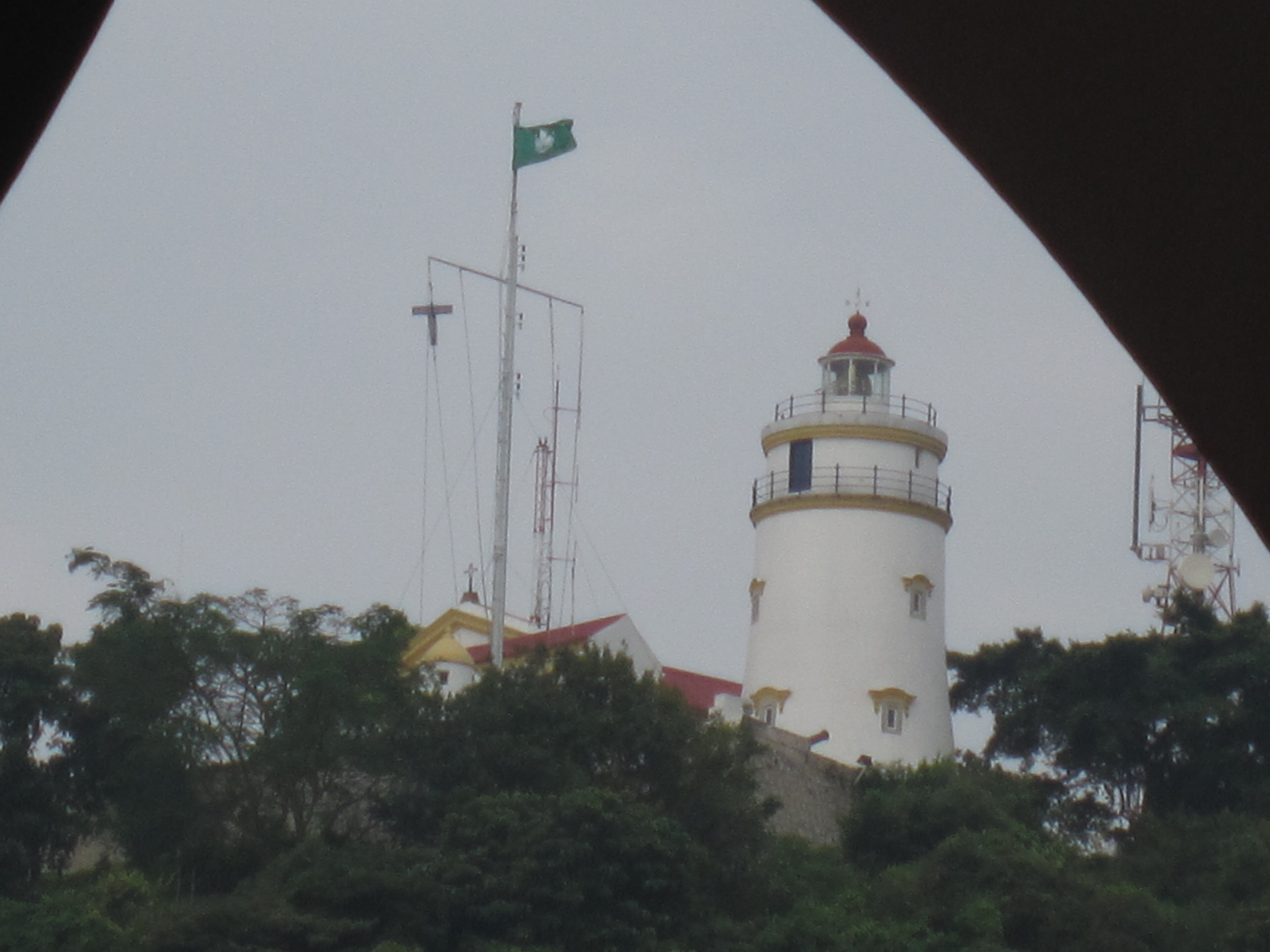 O Sinal N.º 1 de Tempestade Tropical de Macau na Fortaleza da Guia